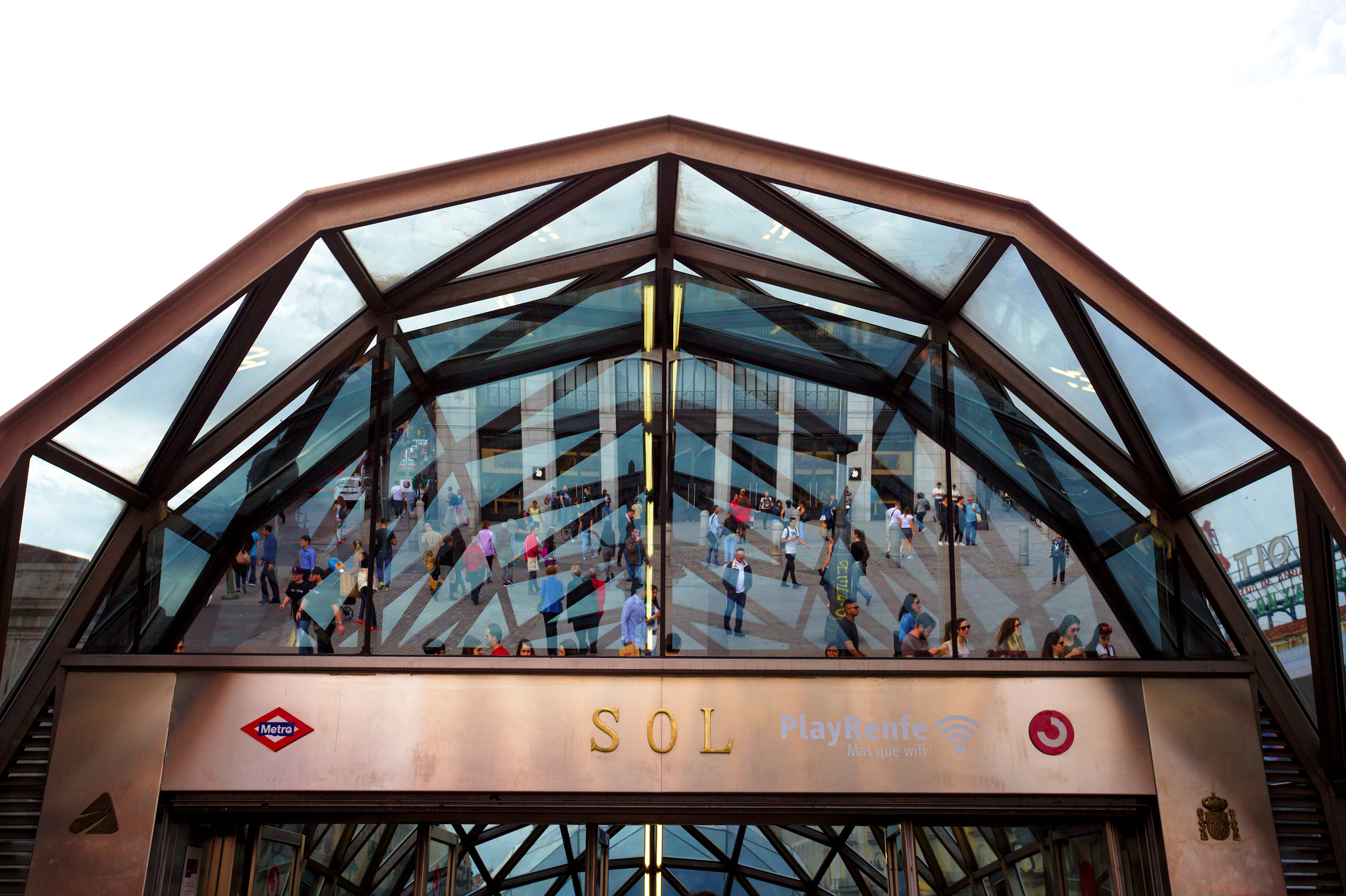 Boca de metro de Sol en 2017